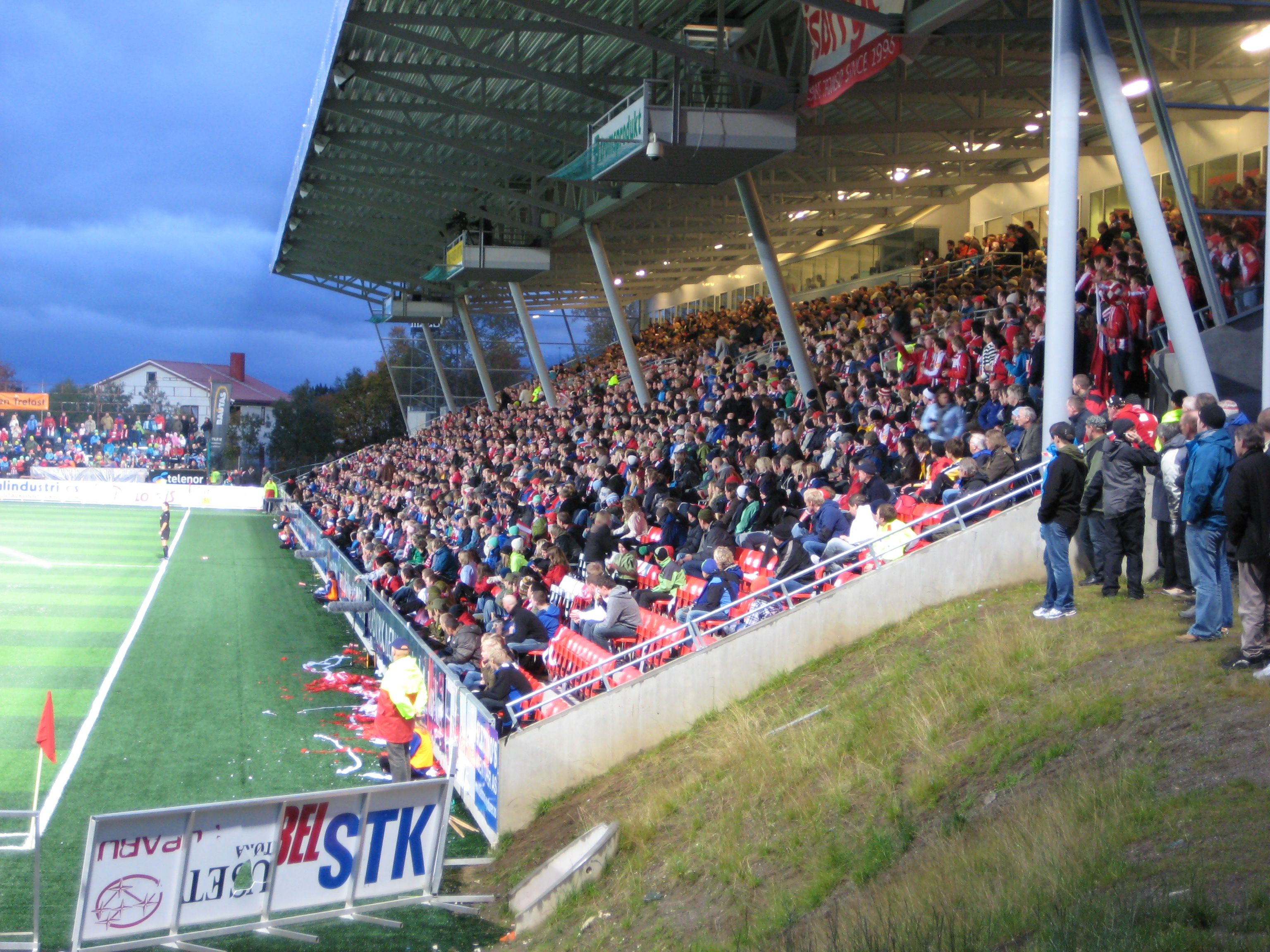 West stand of Alfheim stadium